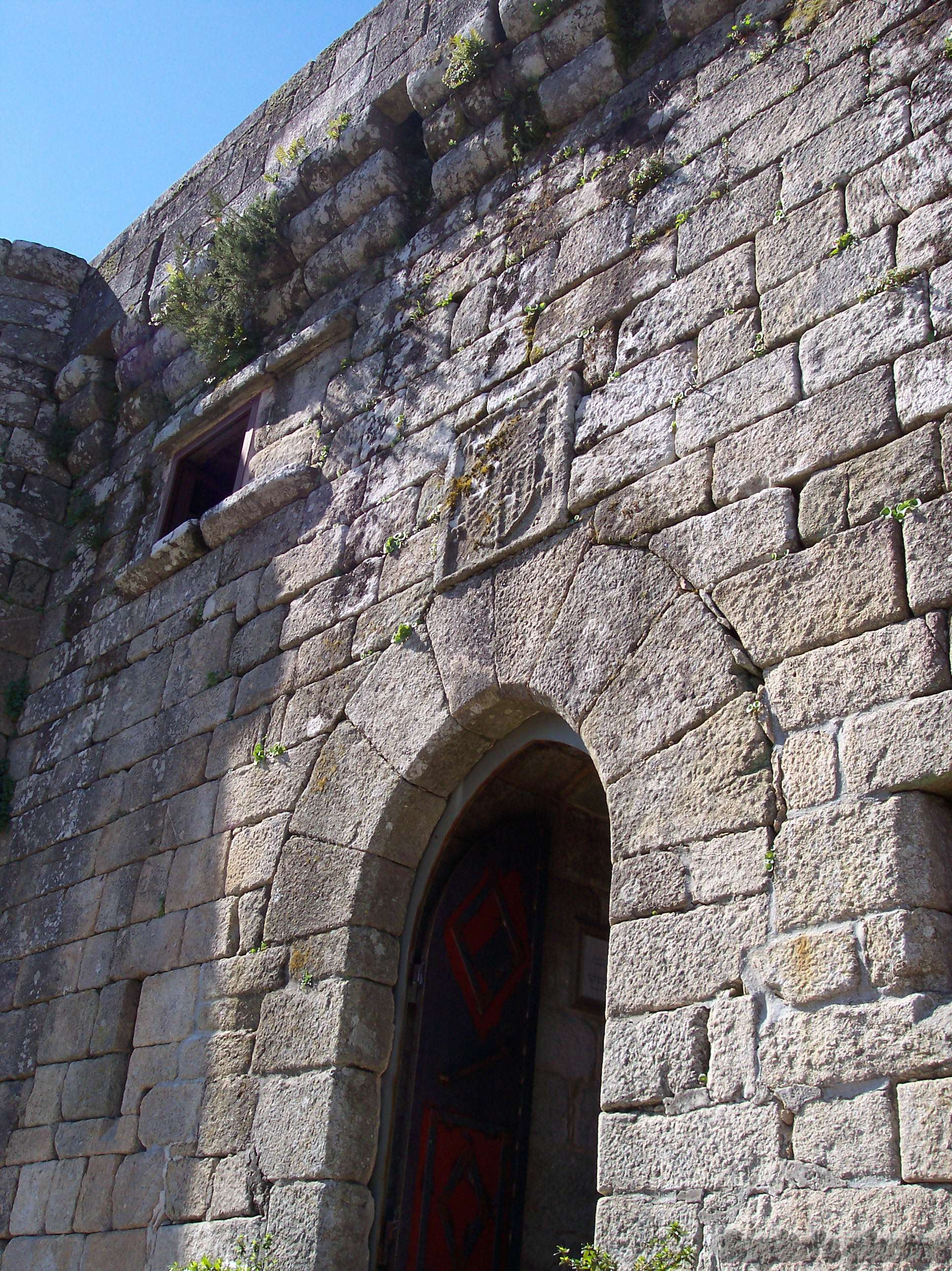 Porta principal do Castelo de Vilasobroso